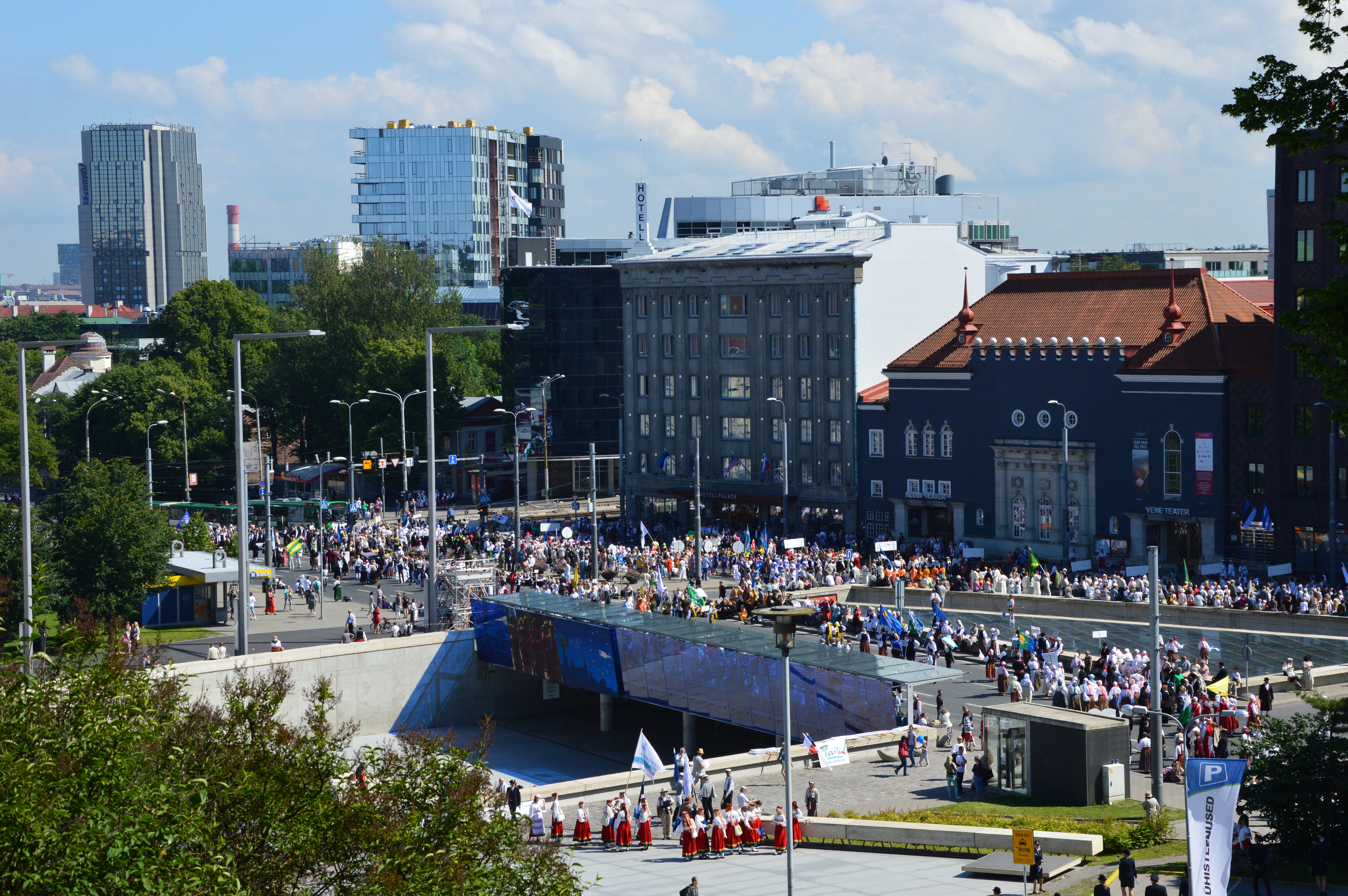 Tallinna vabaduse väljak